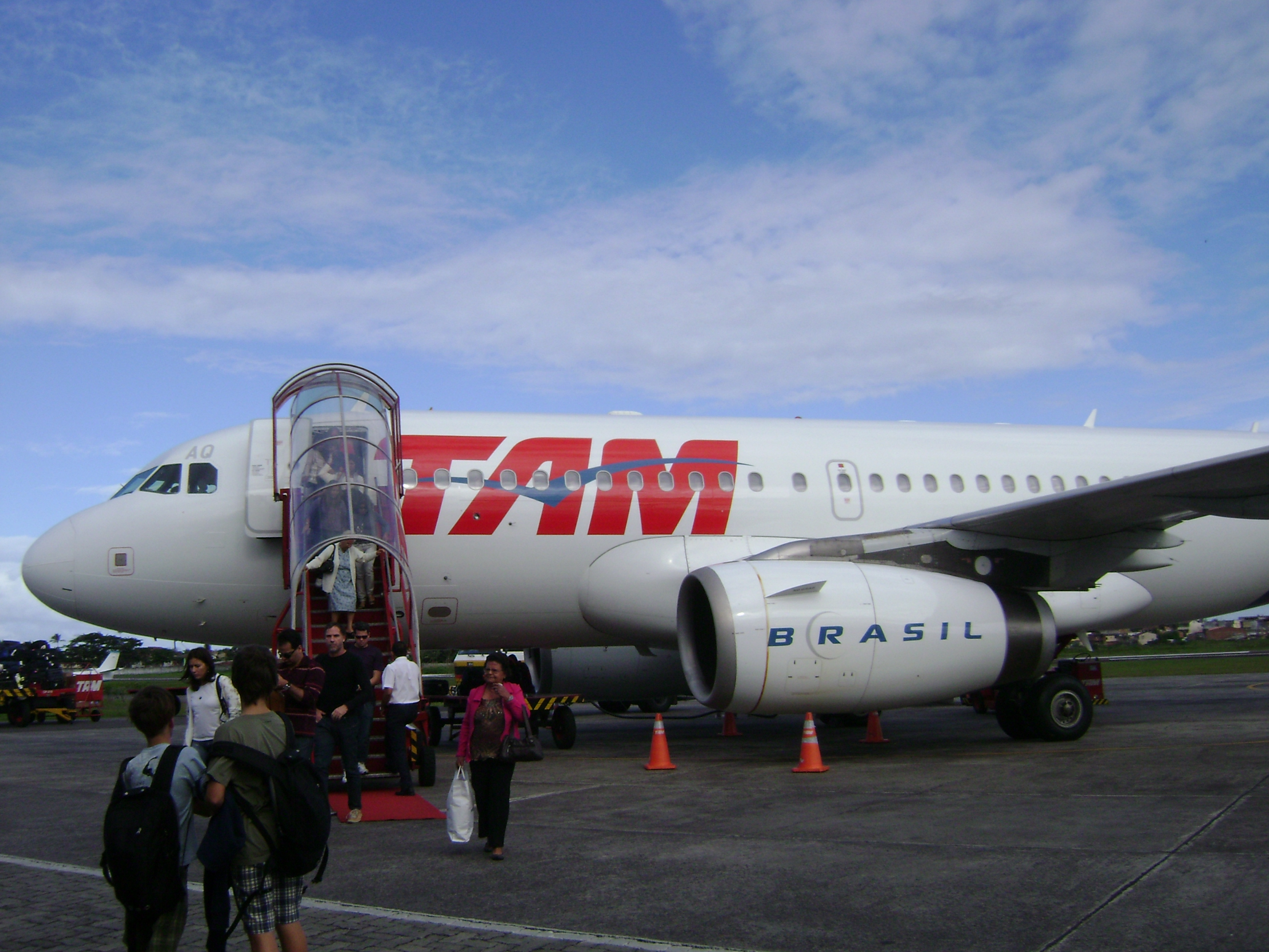 Airbus A319 da TAM no Aeroporto de Ilhéus - Jorge amado, Ilhéus, bahia, Brasil. ORIGINAL:Aeronave da TAM em Ilhéus.